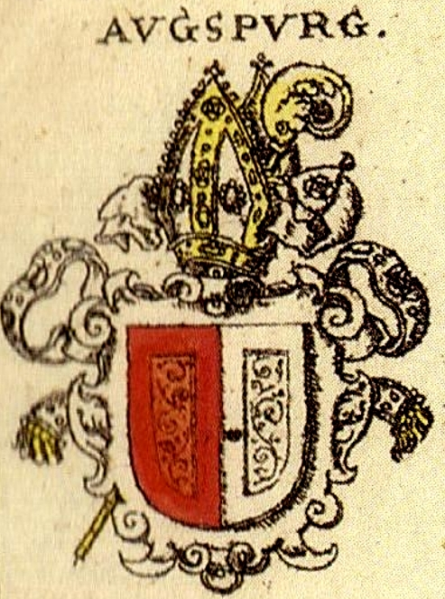 Wappen des Bistums Augsburg nach Siebmachers Wappenbuch